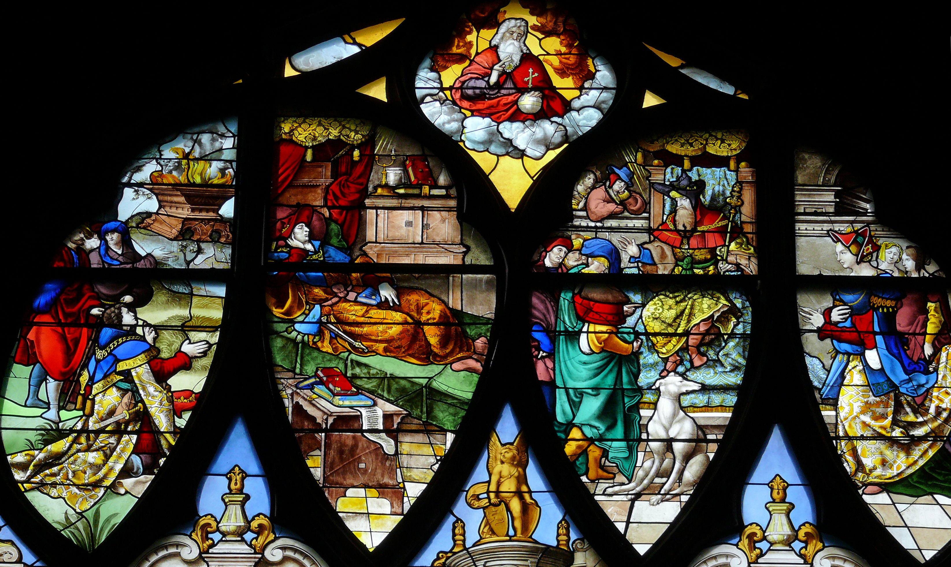 Paris - Eglise Saint-Gervais-Saint-Protais - La Sagesse de Salomon - Tympan de la verrière : Sacrifice de Salomon, Songe à Gabaon et Visite de la reine de Saba - Dieu le Père